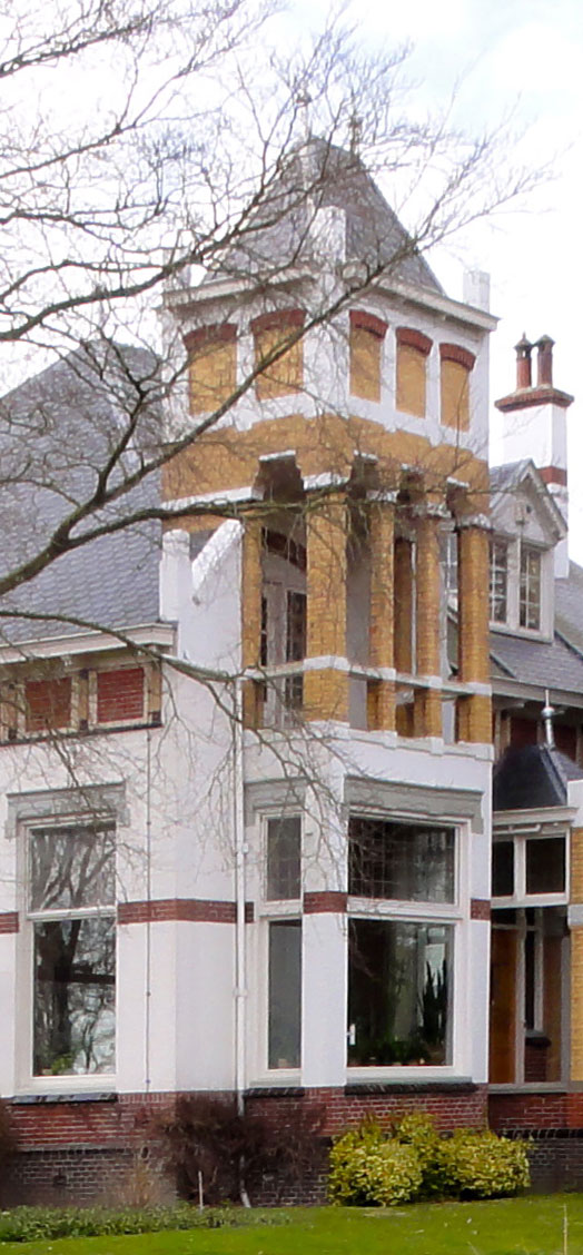 Villa Barmerweg1 Doodstil